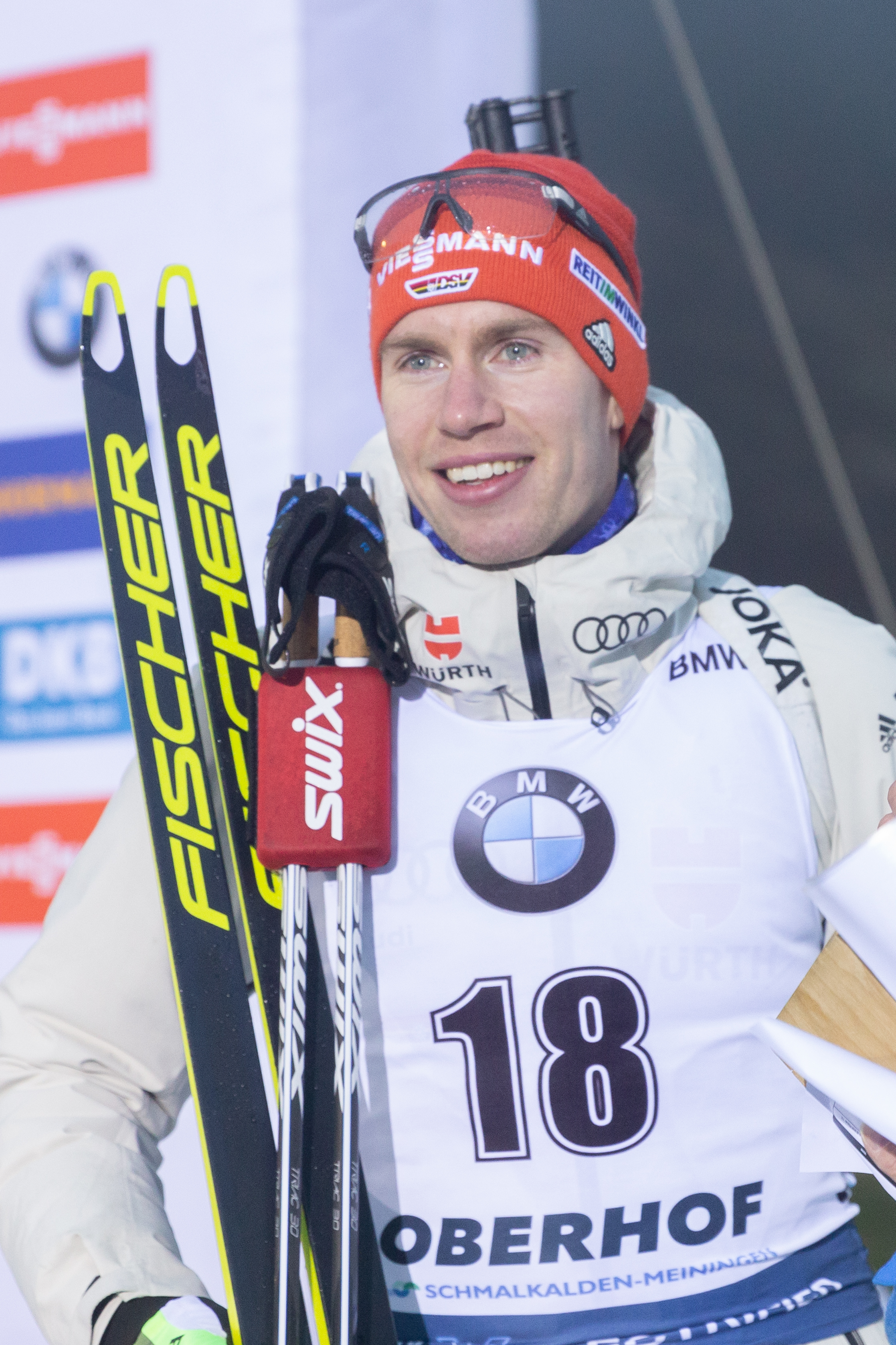 IBU World Cup Biathlon Oberhof; Johannes Kuehn (GER, Deutschland); Drittplatzierter, Bronzemedaille, bronze medal; Porträt, Einzelbild